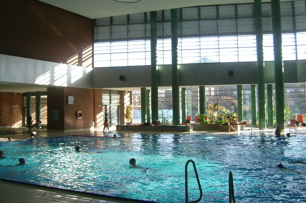 Südstadtbad, Nürnberg